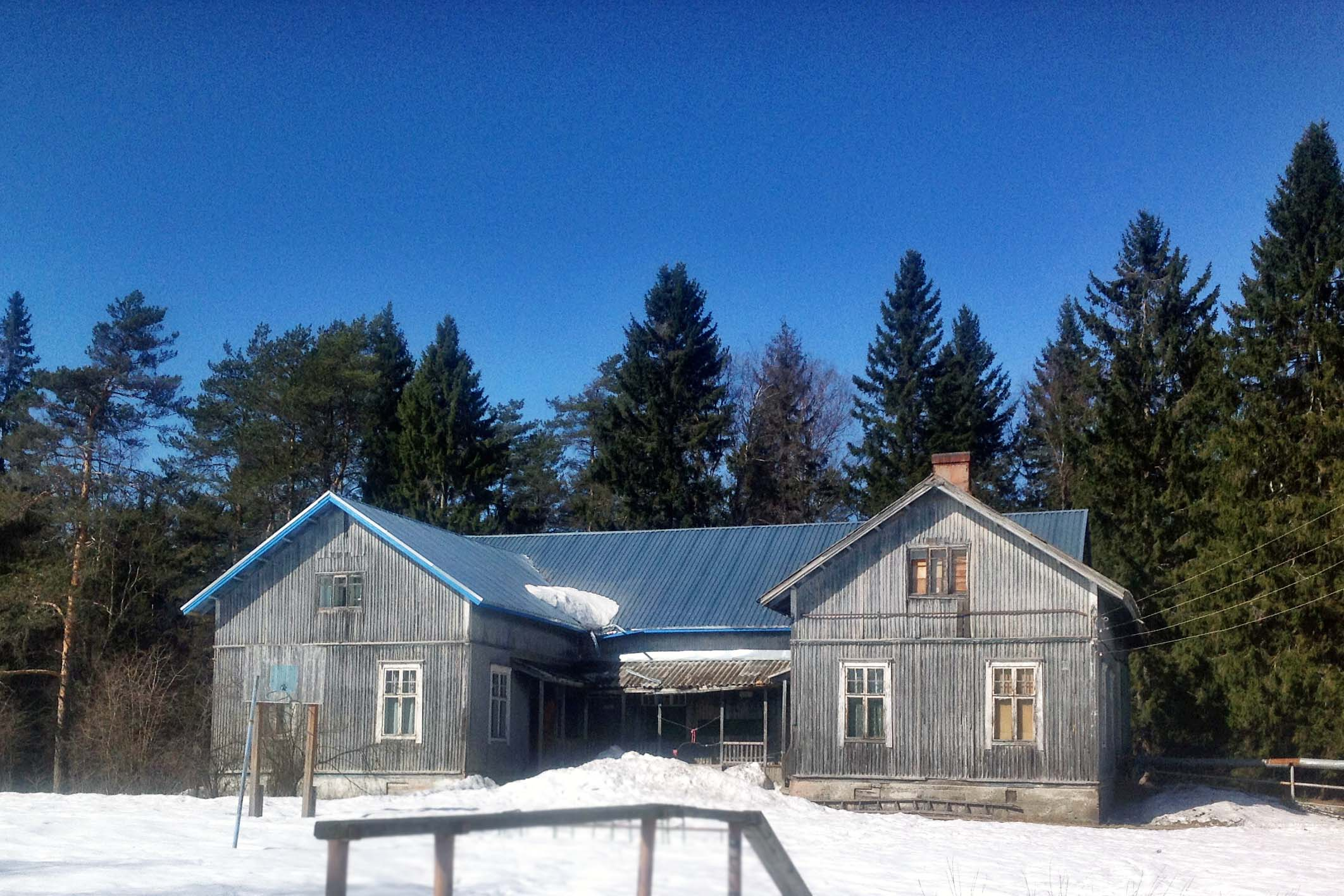 Уроки музыки и физкультурные занятия — в спортзале старой финской школы 1919 года постройки. В ней же расположена библиотека.